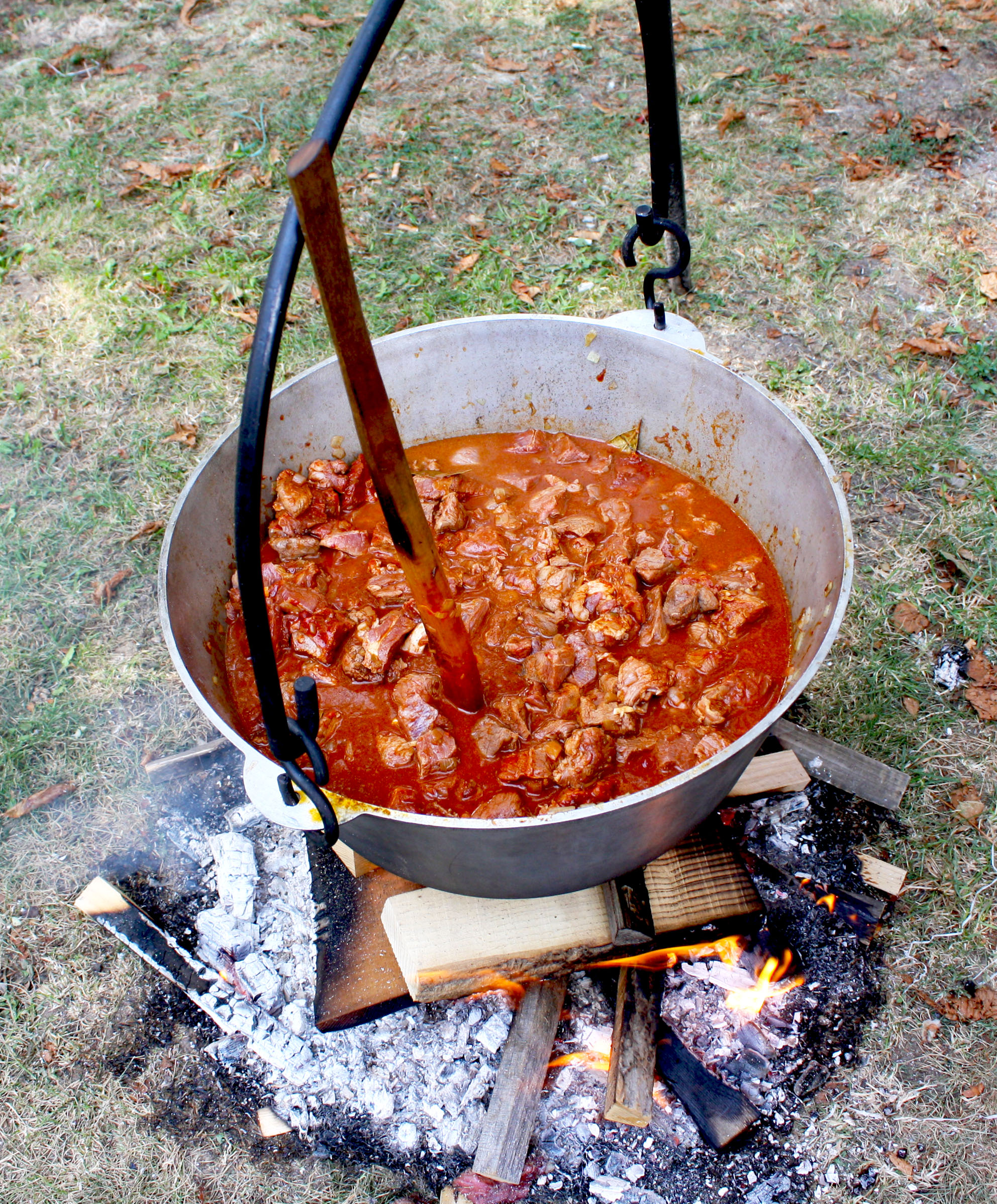 Гуляш (Gulasch) - страва угорської кухні.